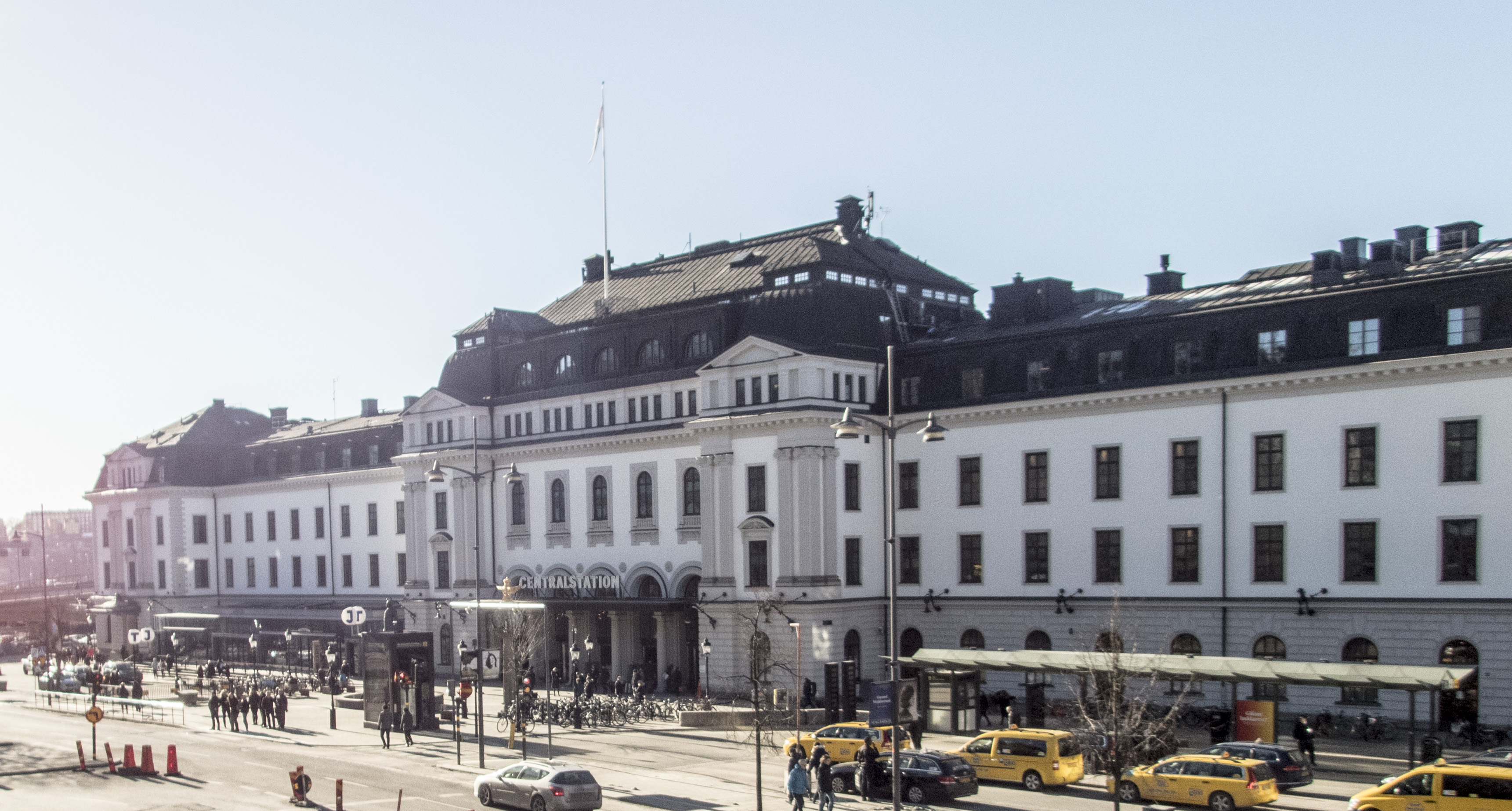 Stockholm centralstation